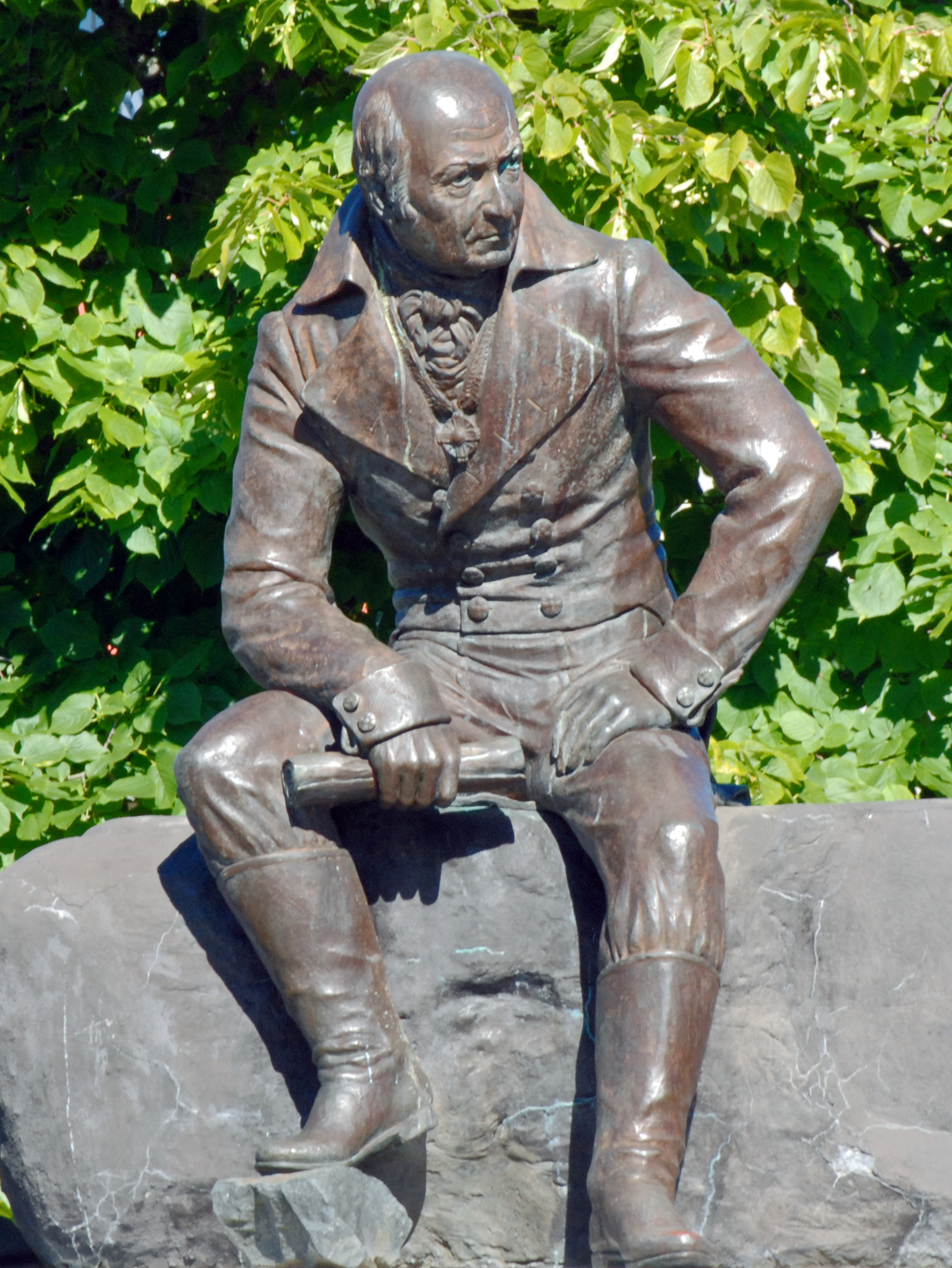 Statue of Aleksandr Baranov / Sitka, Alaska